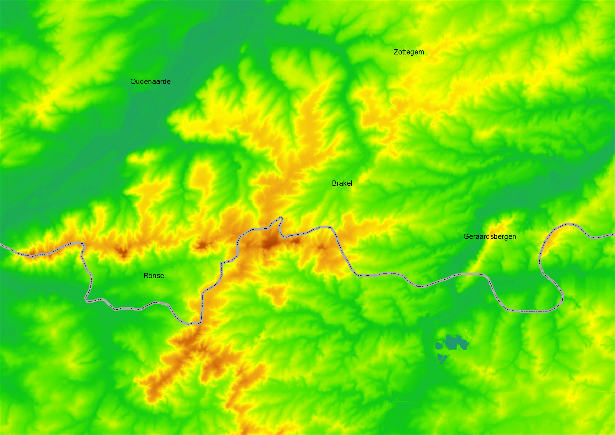 Digitaal terreinmodel van de Vlaamse Ardennen, gemaakt met vrije software op basis van open data